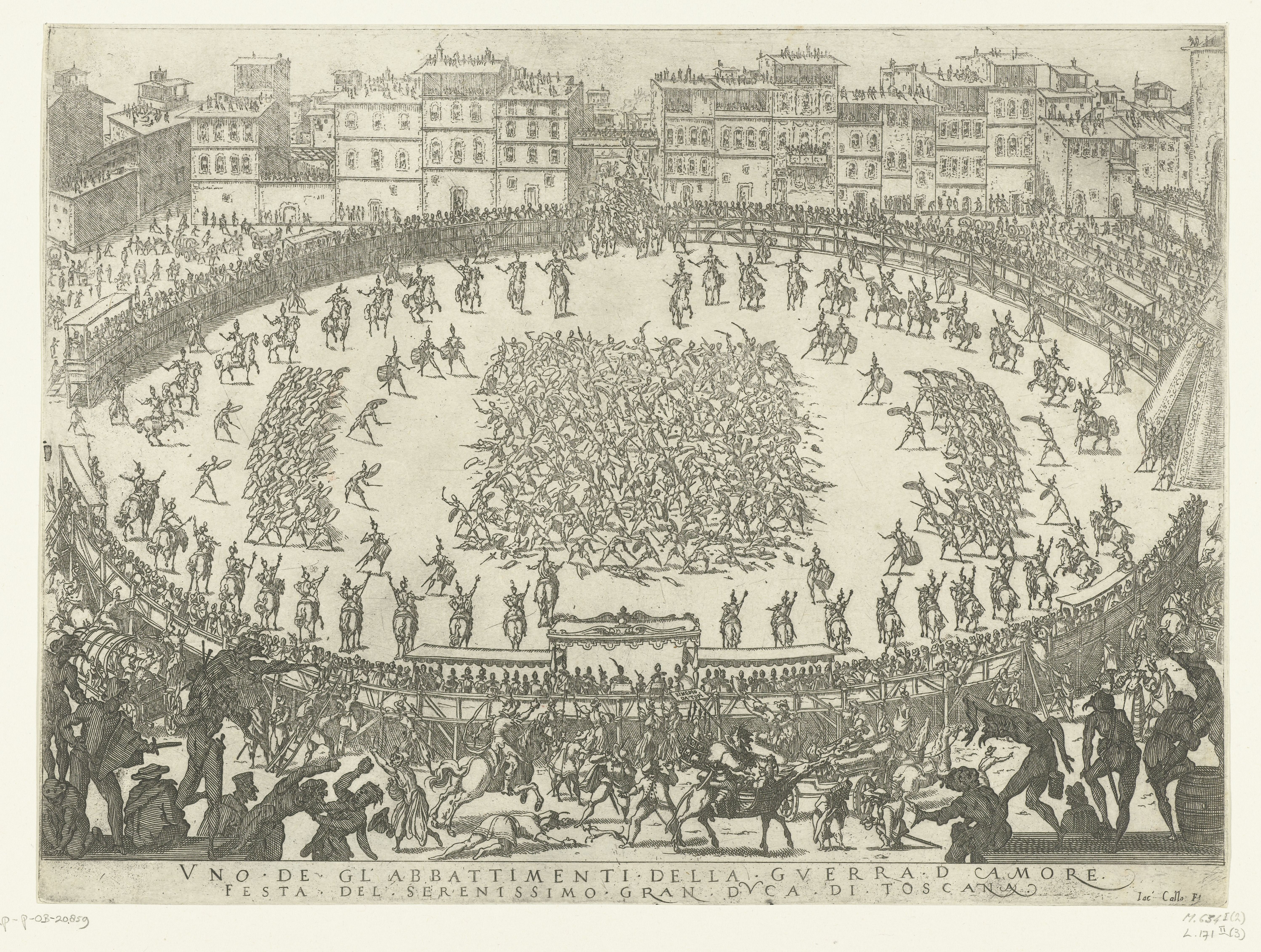 IdentificatieTitel(s): Carnaval te Florence: infanteriegevechtObjecttype: prent Objectnummer: RP-P-OB-20.859Catalogusreferentie: Meaume 634-1(2)Lieure 171-2(3)Opschriften / Merken: verzamelaarsmerk, verso linksonder, gestempeld: Lugt 240Omschrijving: Gezicht op de Piazza Santa Croce in Florence, Waar: soldaten een schijngevecht uitvoeren voor toeschouwers, die op in ovaalvorm geplaatst tribunes zitten. Dit gevecht vond plaats tijdens het carnavalsfeest 'Guerra d'Amore', dat Cosimo II de' Medici in 1616 in Florence gaf. Onder de voorstelling twee regels Italiaanse tekst.VervaardigingVervaardiger: prentmaker: Jacques Callot (vermeld op object)naar ontwerp van: Giulio Parigiuitgever: Zanobi PignoniPlaats vervaardiging: FlorenceDatering: 1616Fysieke kenmerken: etsMateriaal: papier Techniek: etsenAfmetingen: blad: h 225 mm × b 302 mmToelichtingGebruikt als illustratie in: Andrea Salvadori, ‘Guerra d'Amore. Festa del Serenissimo Gran Duca di Toscana Cosimo Secondo' (Florence: Zanobi Pignoni, 1616). Klinkert, C.OnderwerpWat: Carnival, Shrovetide (non-liturgical celebration)village square, placehand-to-hand fighting (~ battle)Wanneer: 1616 - 1616WaarFlorencePiazza Santa CroceWie: Cosimo II de'MediciVerwerving en rechtenVerwerving: overdracht van beheer 1816Copyright: Publiek domein